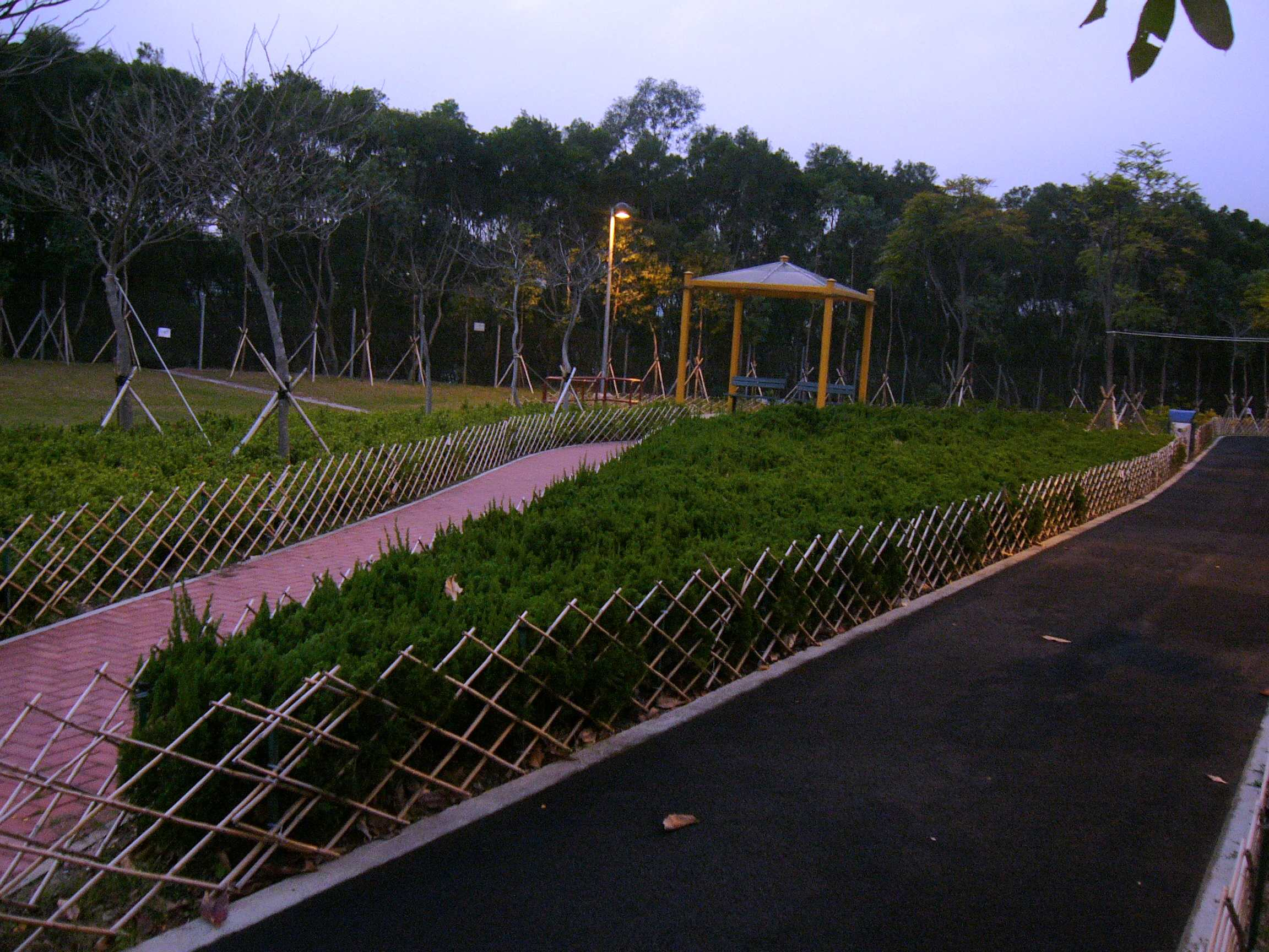 Sai Tso Wan Playground, Hong Kong